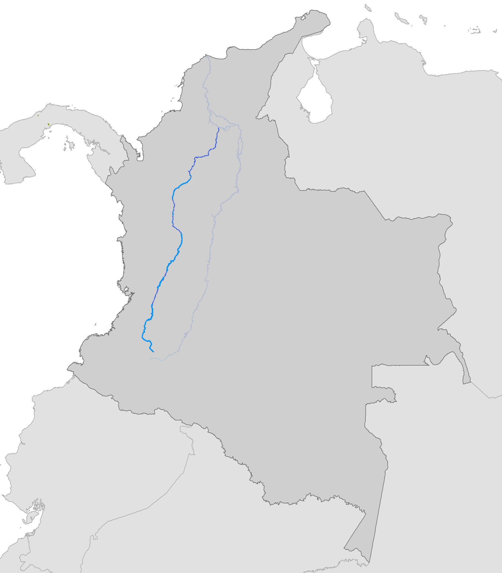 Localización Río Cauca en Colombia, el Río Magdalena se ve en azul menos intenso